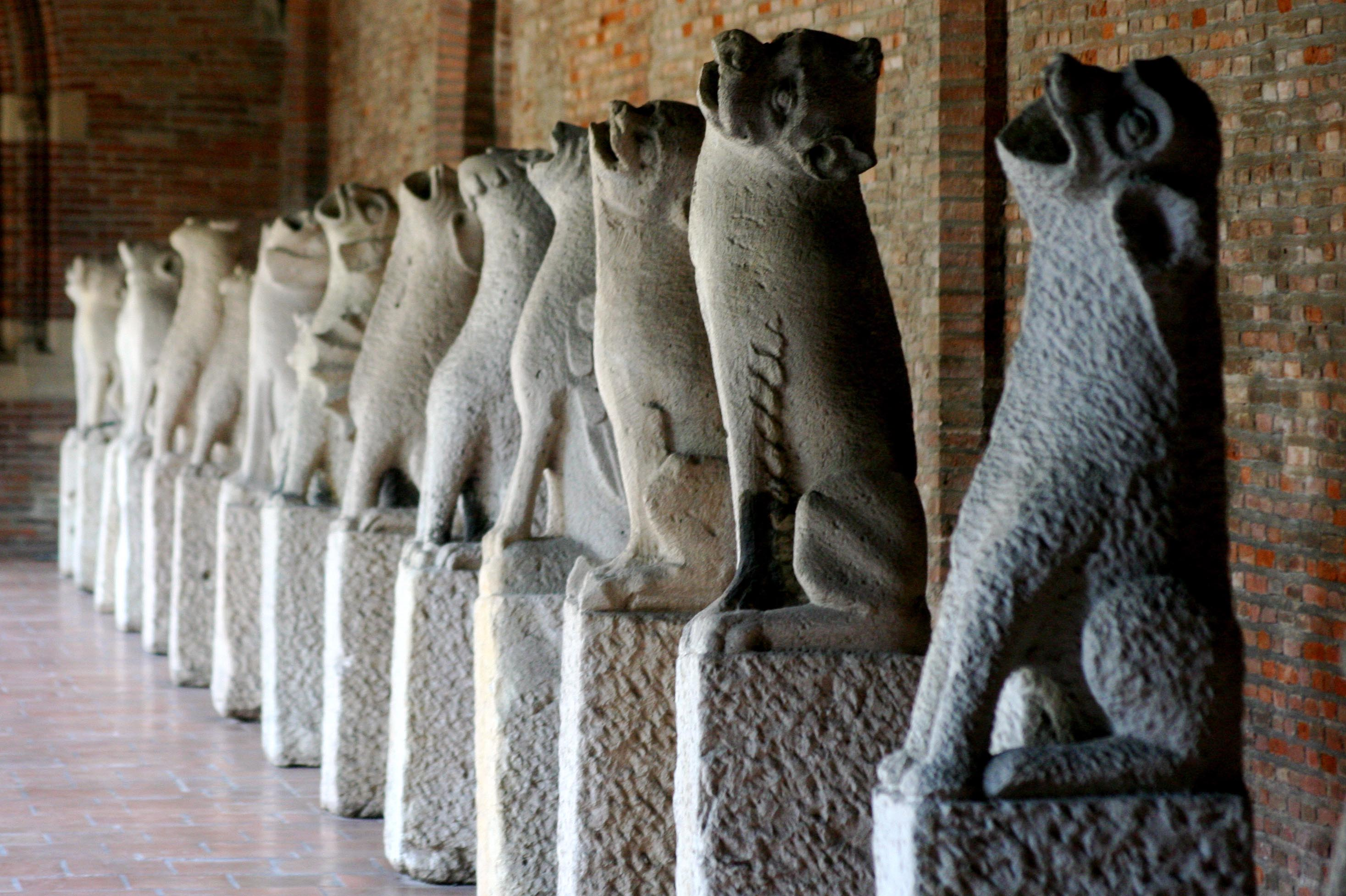 Gargouilles provenant de l'ancienne église des Cordeliers, Toulouse, musée des Augustins